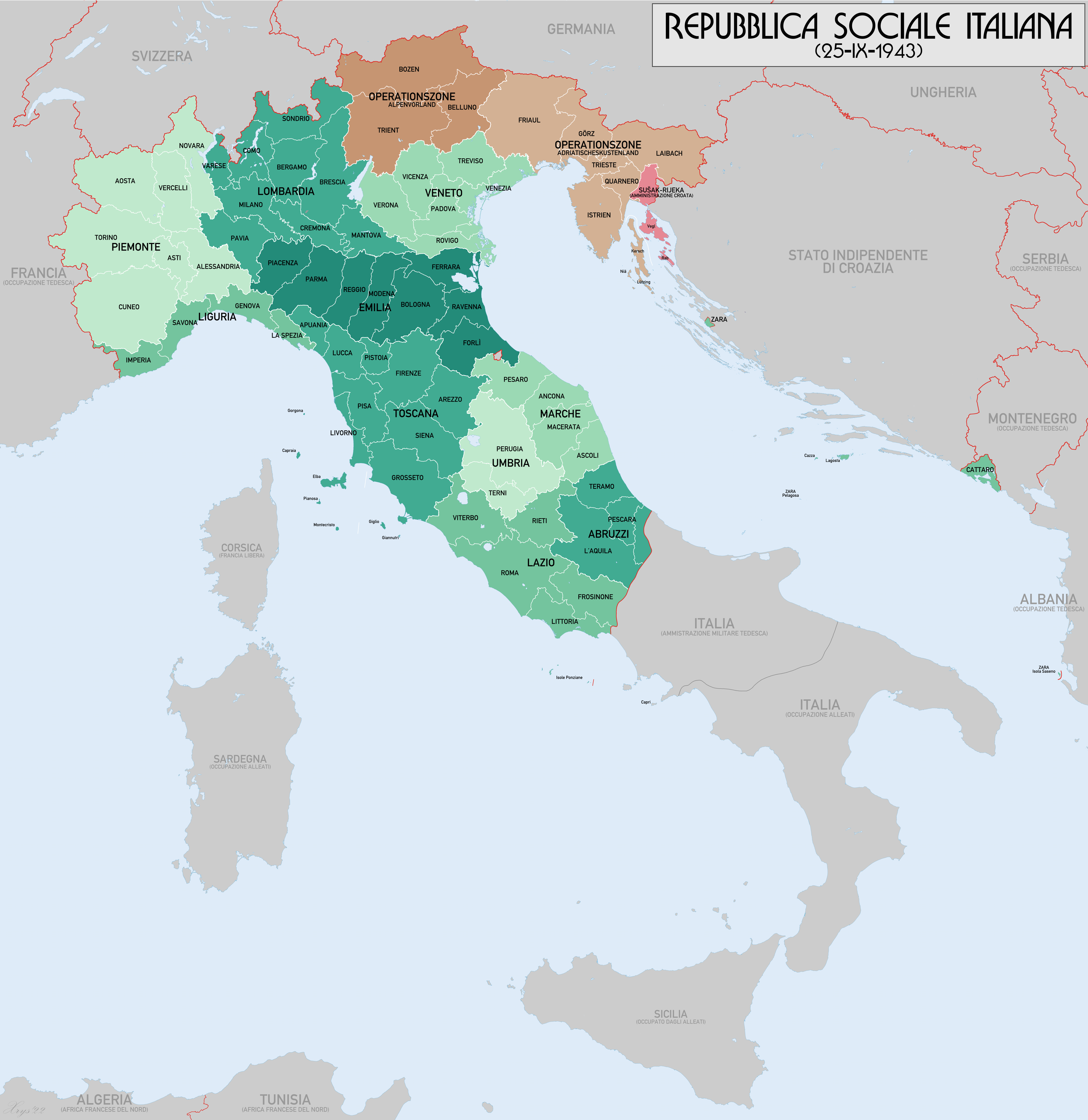 Mappa amministrativa della Repubblica Sociale Italiana. La mappa mostra regioni e province. Dati sorgenti: Italia 250k (AMS 508), Italia 100k (GSGS 4164), Italia 100k (Deutsche Heereskarte) a cura di